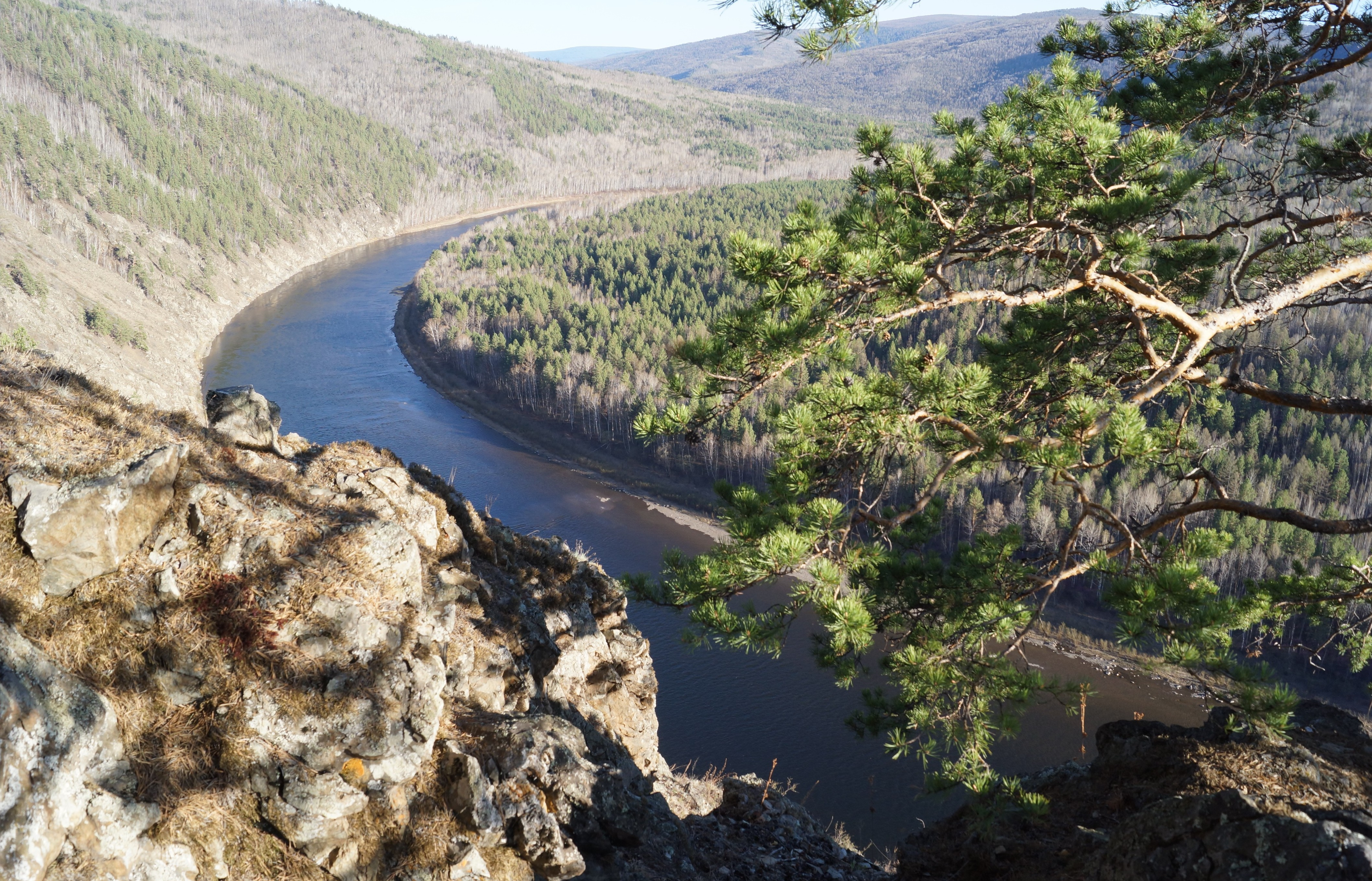 Чикой, Красночикойский район This image is related to the protected area of Russia number 7500081